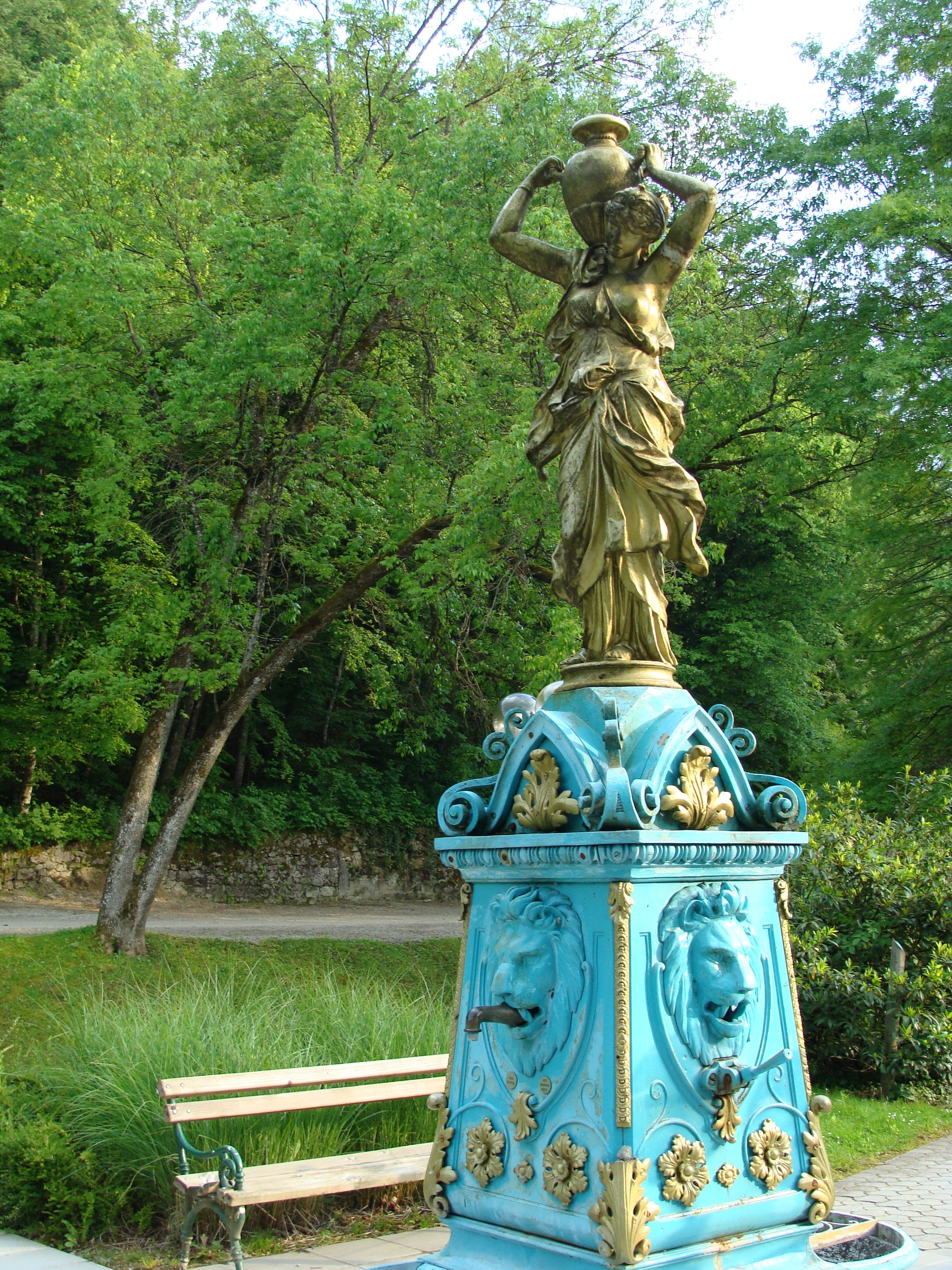 Vodnjak z motivom žene z vrčem, Park Term Šmarješke Toplice